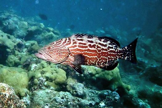 Fotgrafado em Abrolhos, março de 1999.